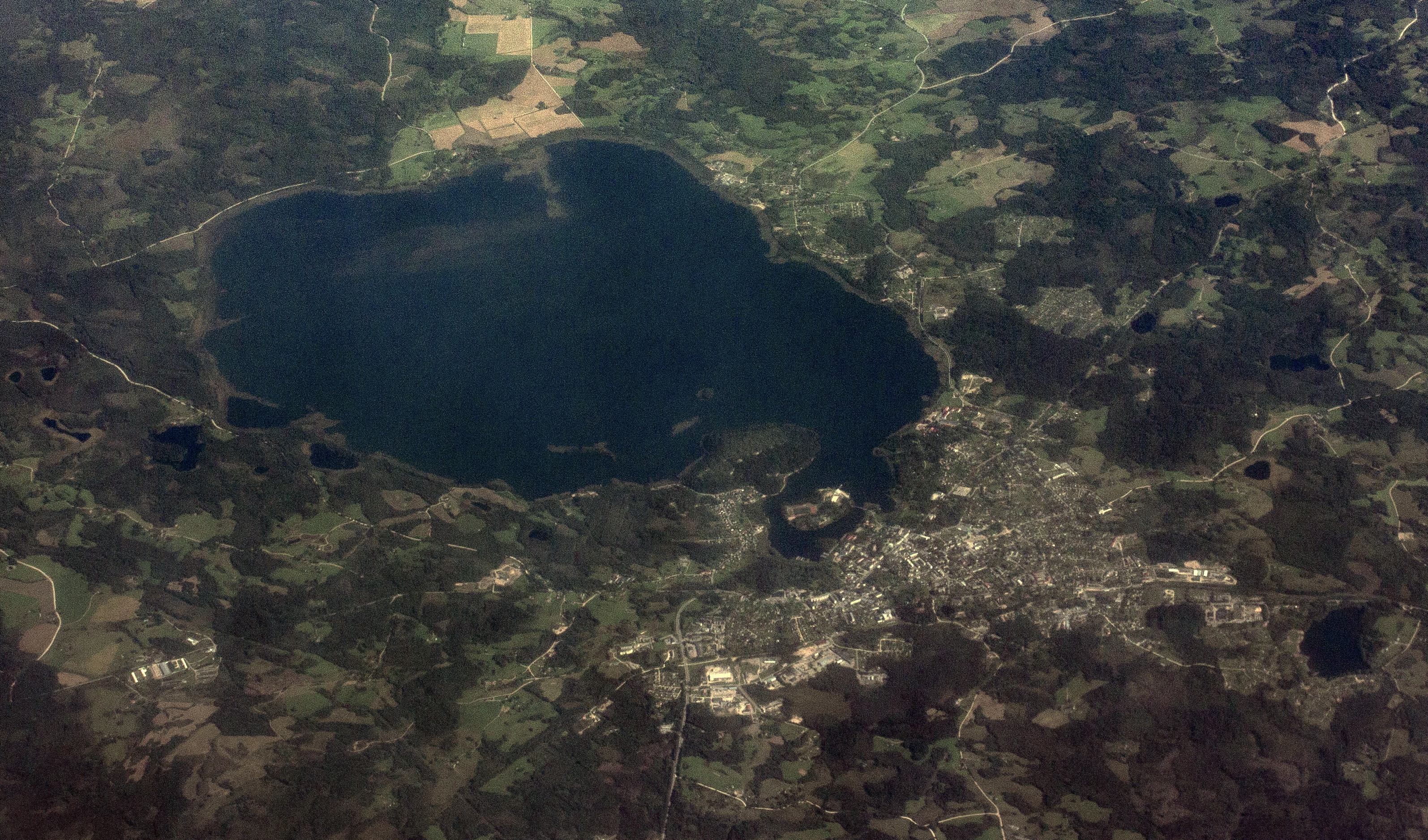 Вид с самолёта на город Алуксне, Латвия